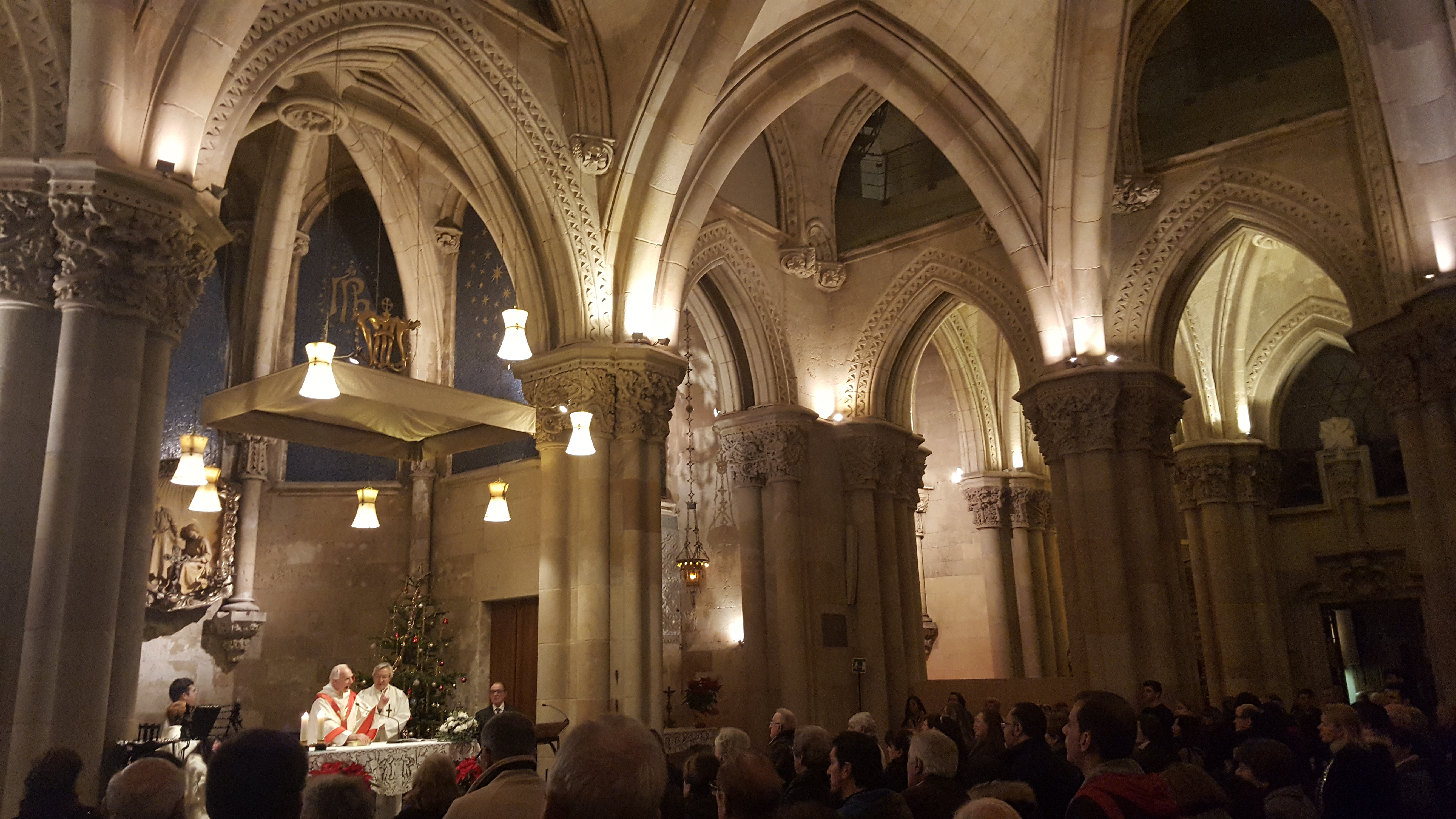 Missa a la Cripta de la Sagrada Familia